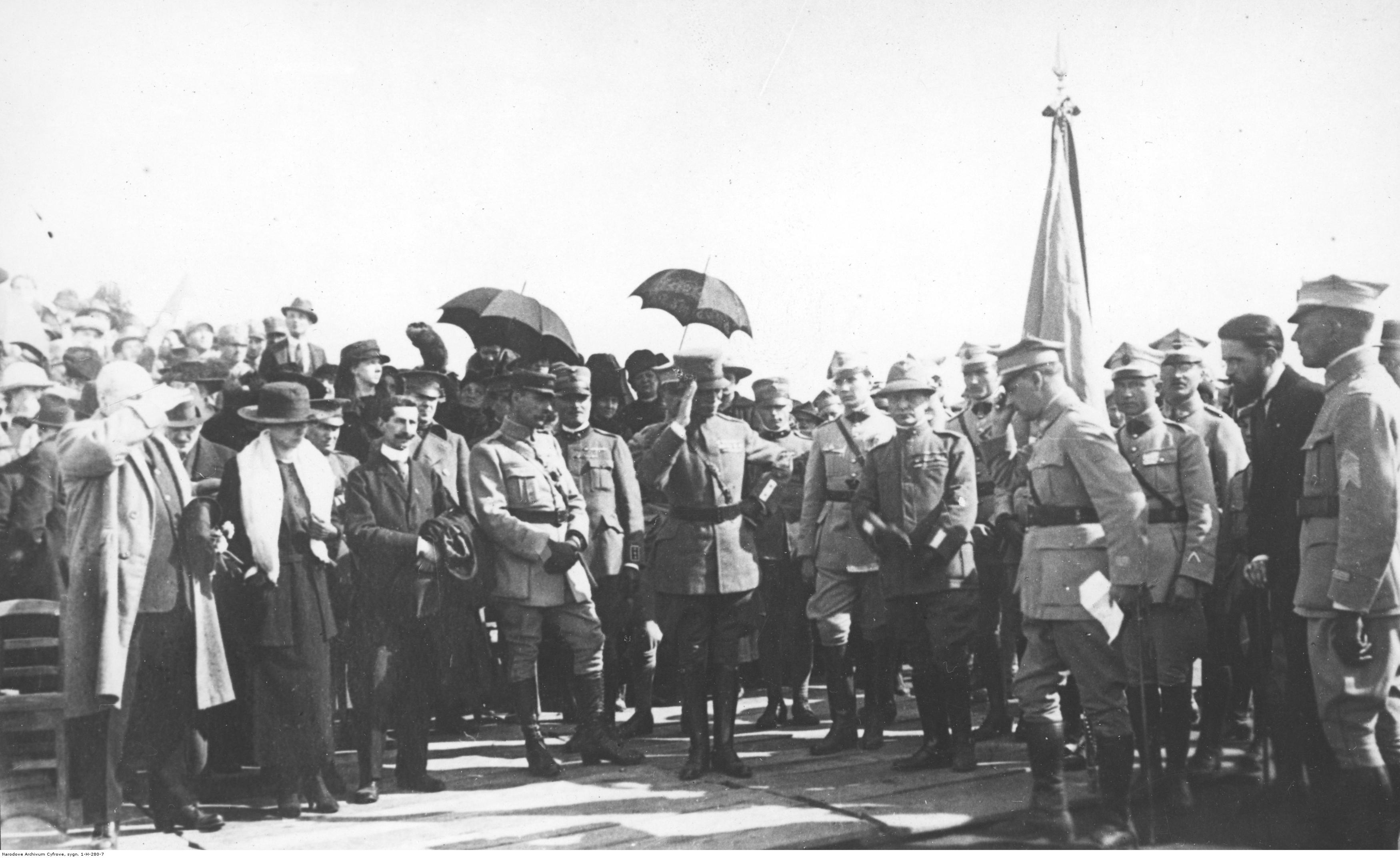 Polski obóz wojskowy w La Mandria di Chivasso. Burmistrz miasta Chivasso ofiarowuje sztandar pułkowi im. Zawiszy Czarnego. Koncern Ilustrowany Kurier Codzienny - Archiwum Ilustracji. Sygnatura: 1-H-280-7